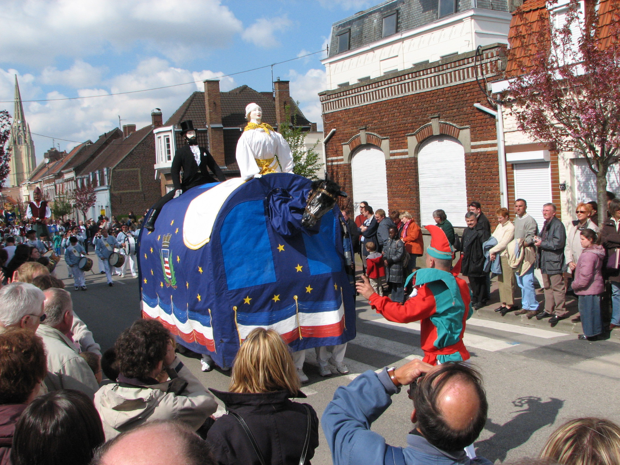 Le Poulain de Pézenas (Hérault) Photo personnelle. Ronde des géants 2006 à Steenvoorde. Pas de copyright